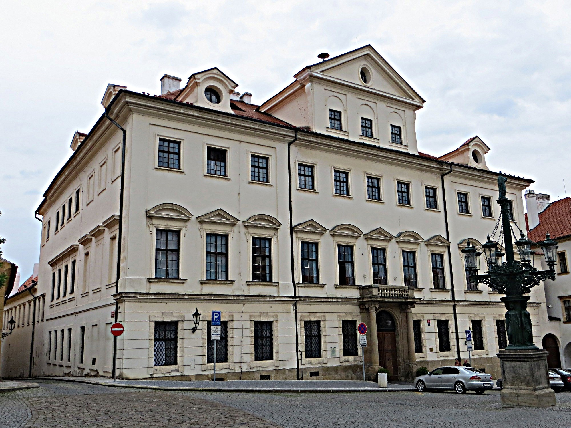 Loretánská